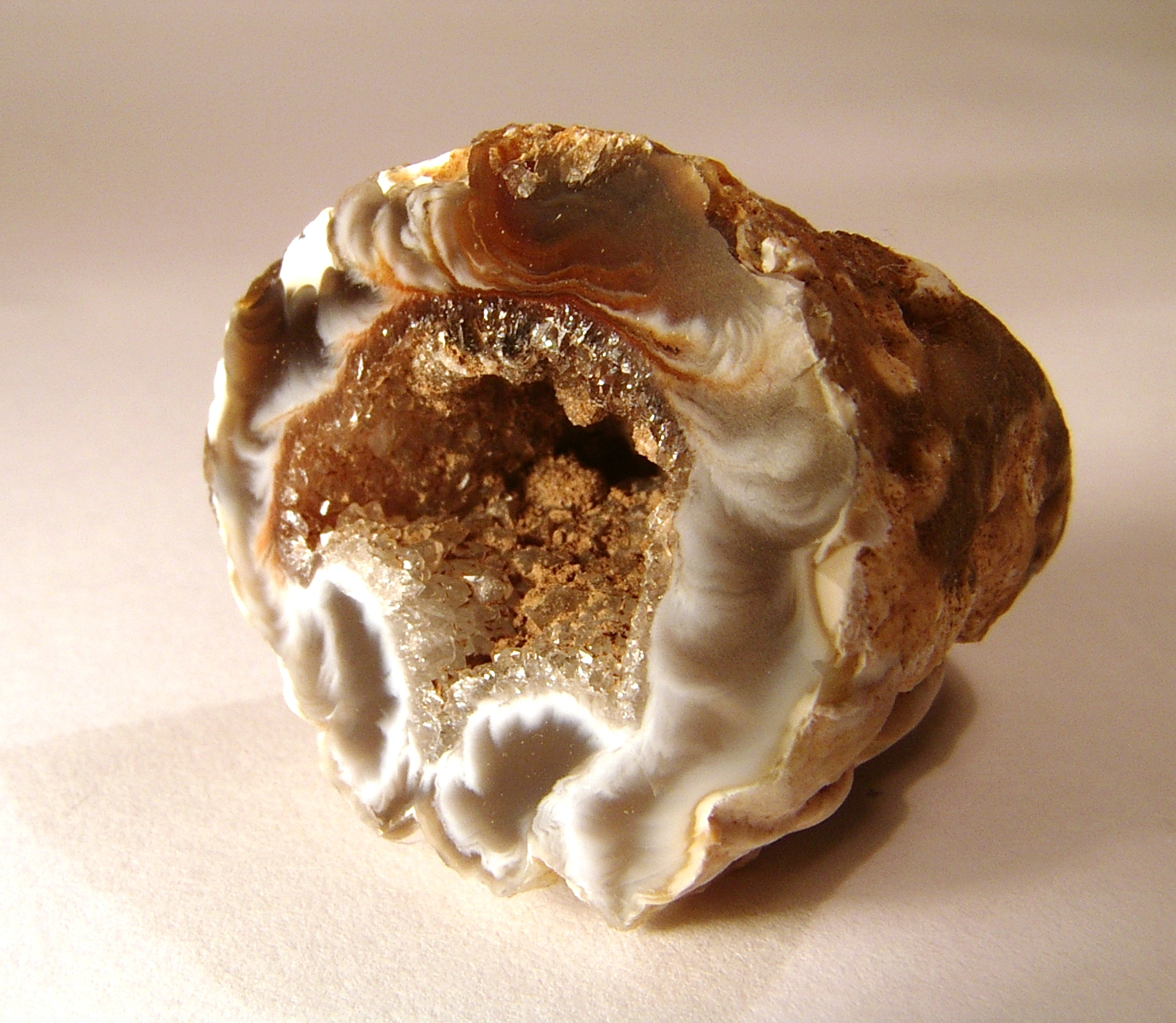 Author: Daniel Miłaczewski